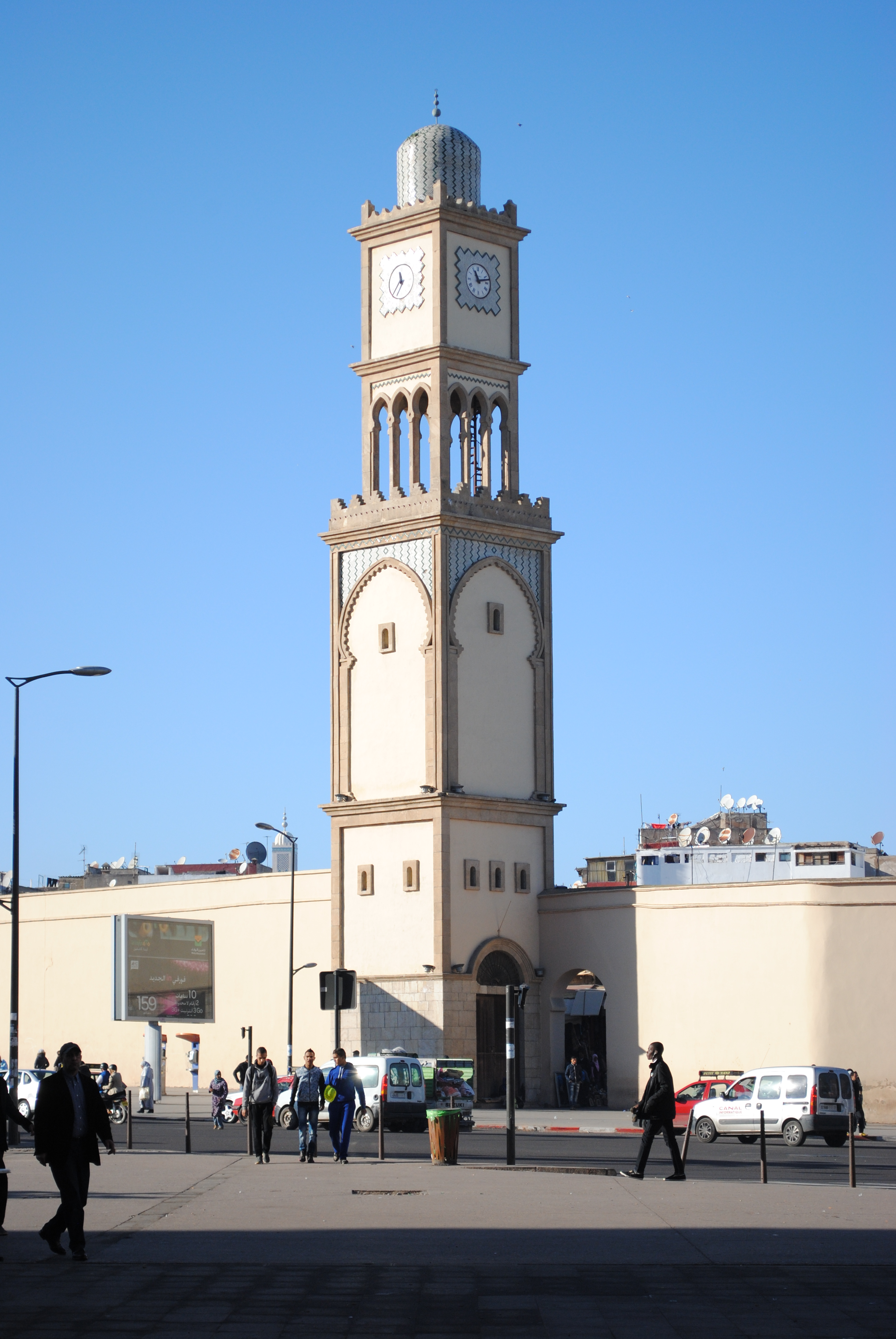 Tour de l'Horloge